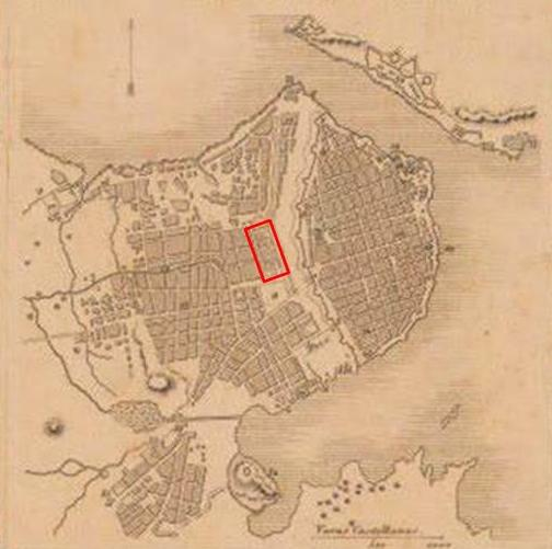 Terrenos que ocupaba en 1850 la estación de ferrocarril de Villanueva, en La Habana, Cuba, actualmente ocupados por el Capitolio.